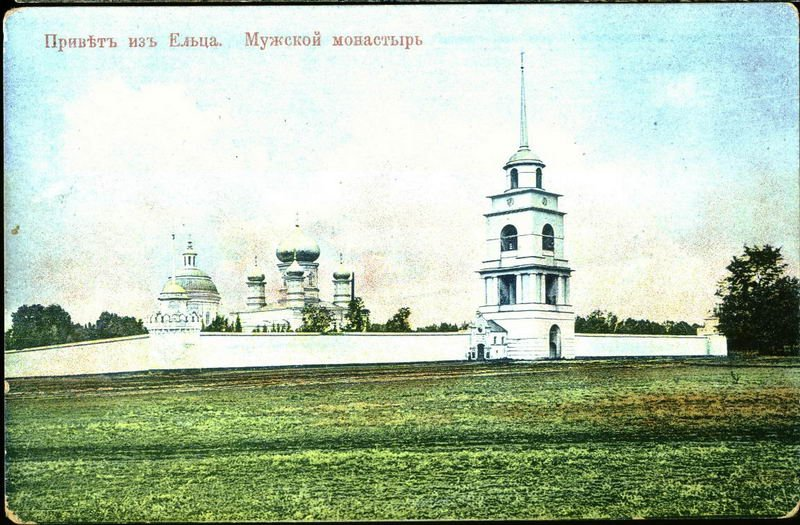 Открытка начала 20 века (до 1912 года). На изображении - комплекс Троицкого монастыря в городе Елец (ныне Липецкой области)